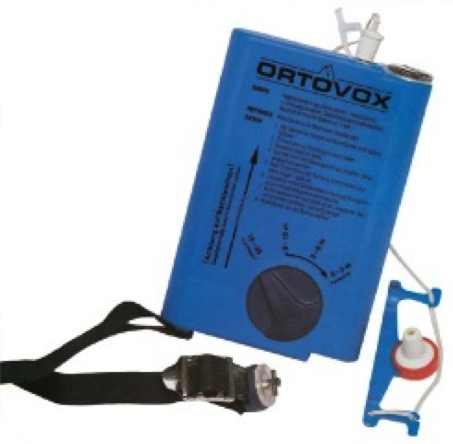 LVS Gerät F2 der Firma Ortovox, das im Jahr 1980 erfunden wurde